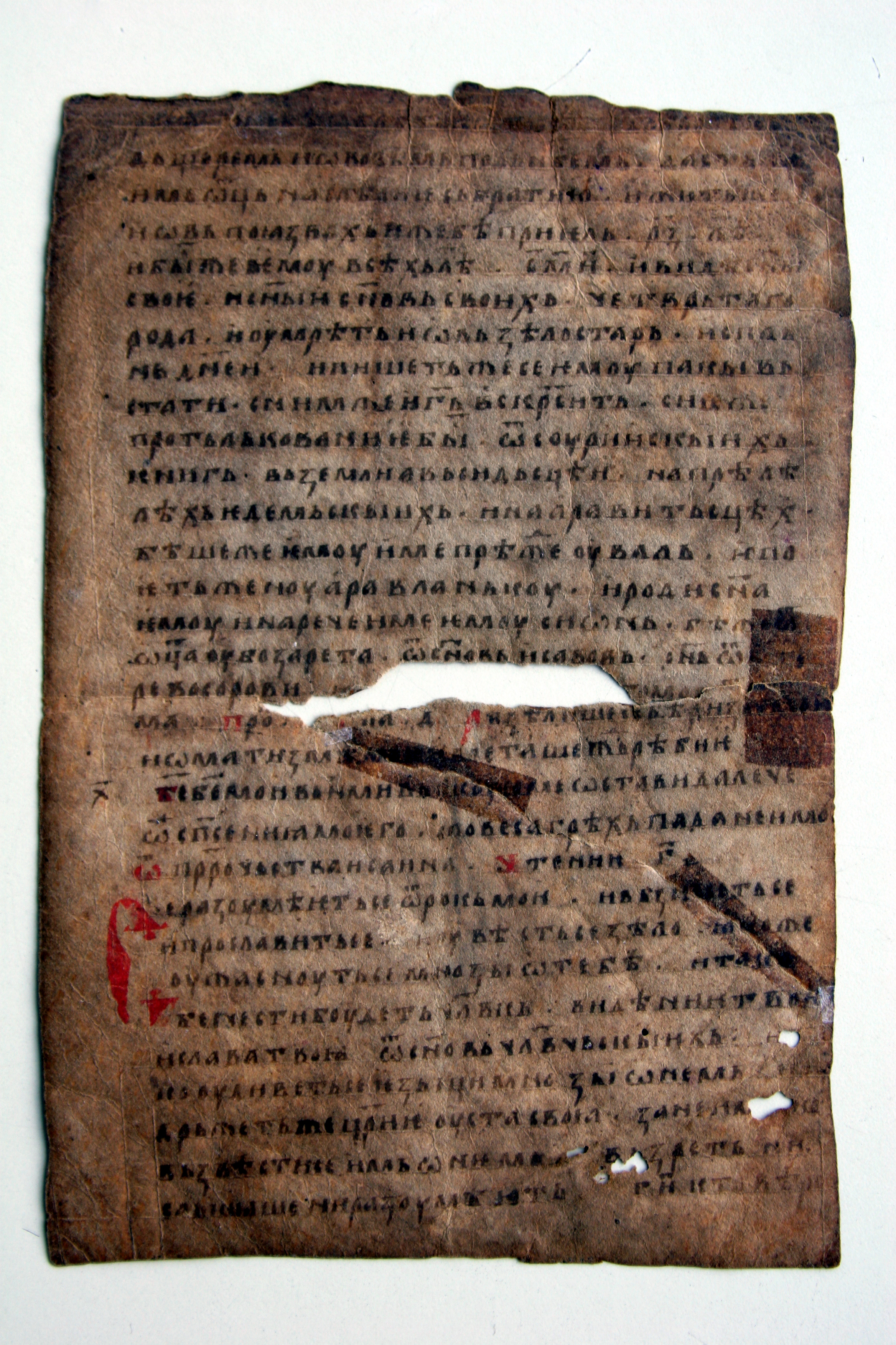 Поменик на манастирот „Св. Јован Бигорски“, Дебарско, од XVII век